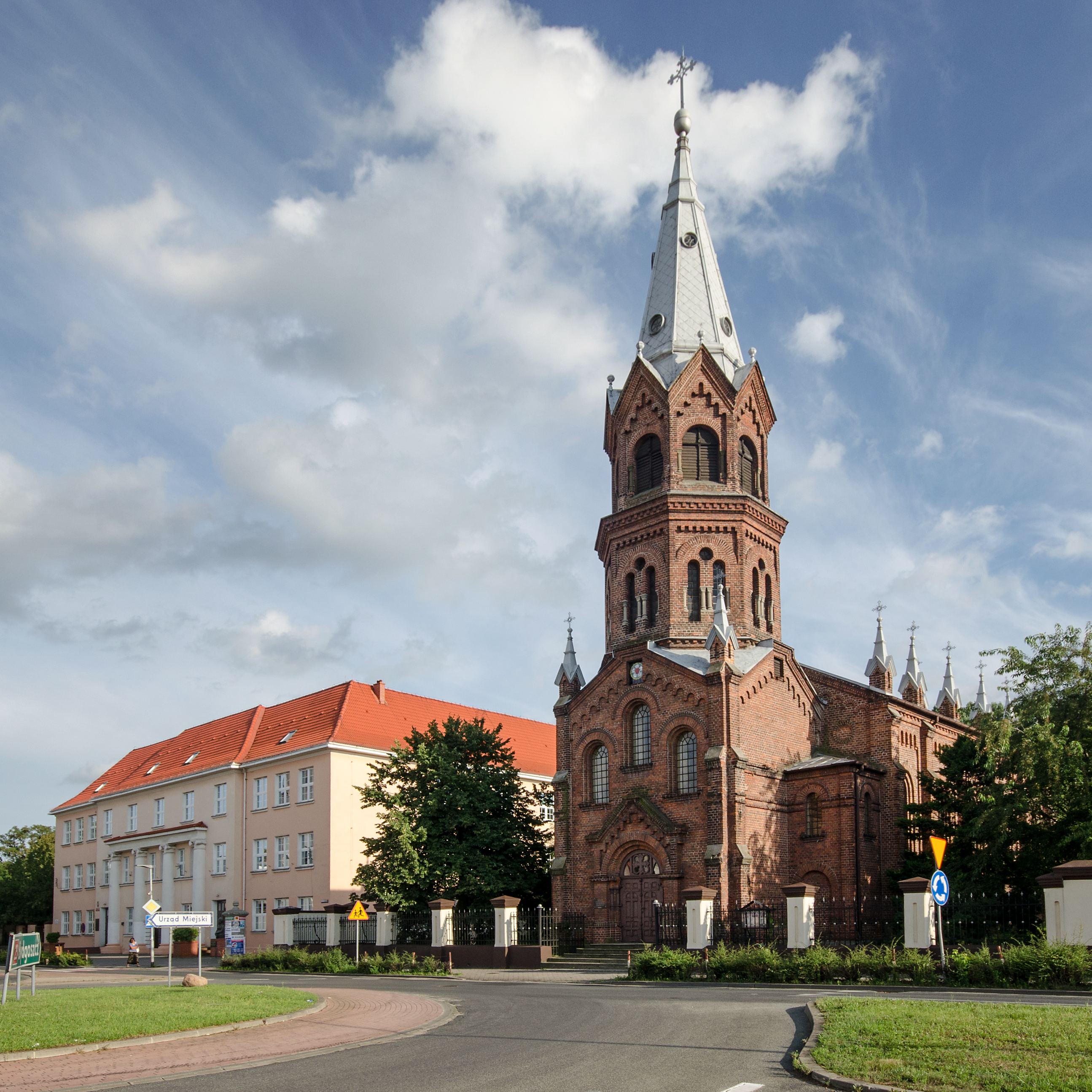 Konin, kościół ewangelicki, 1852-1854, 1909